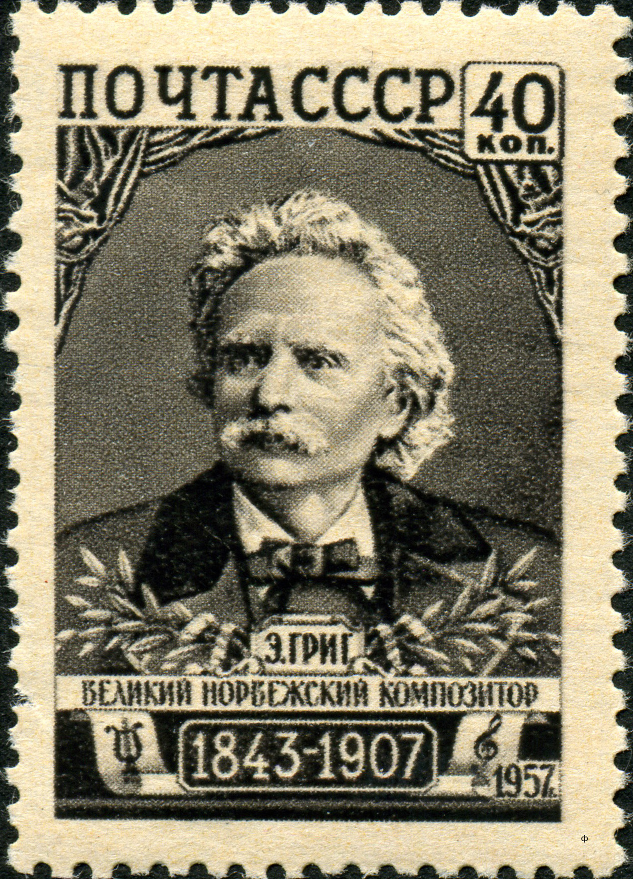 Марка СССР